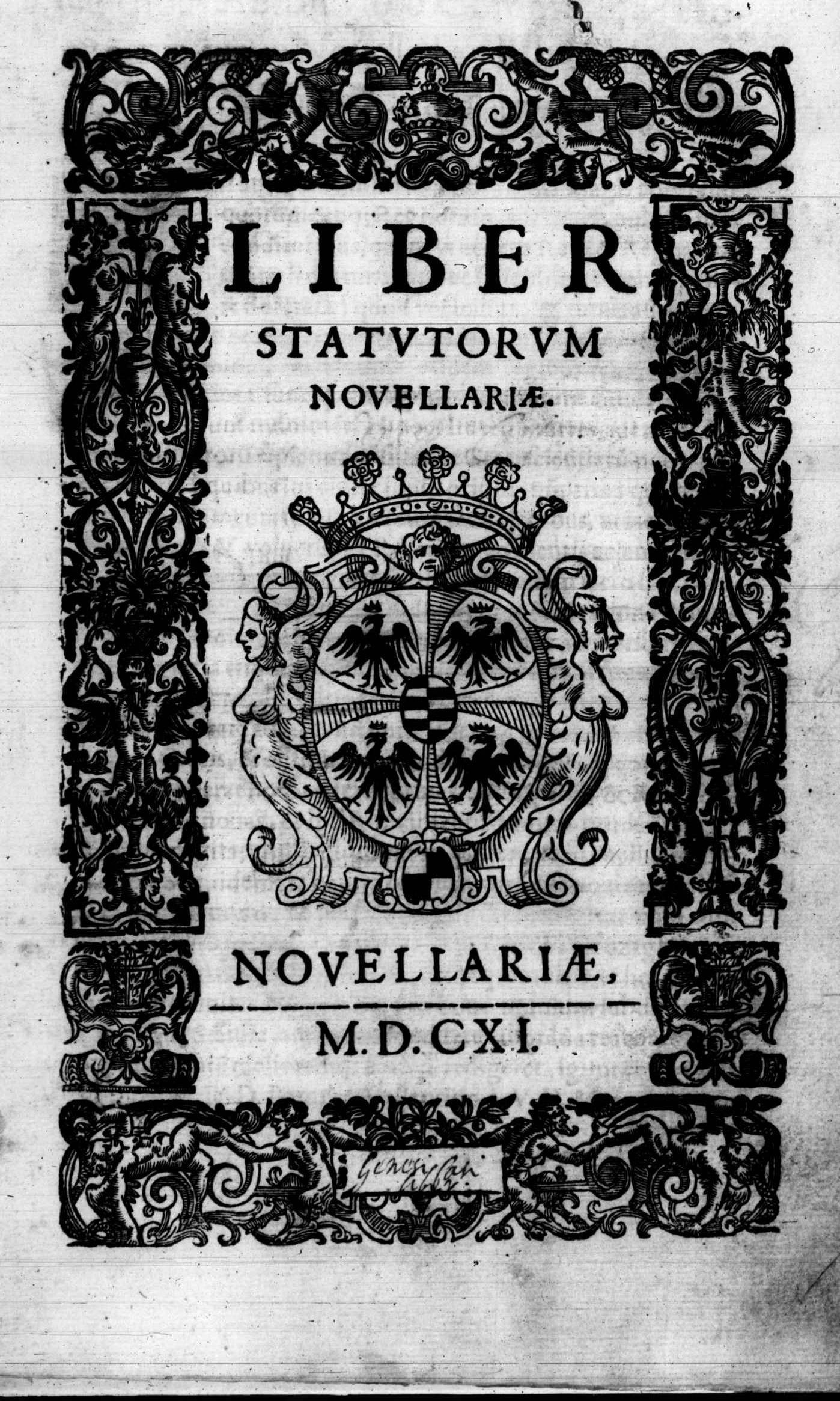 Frontespizio